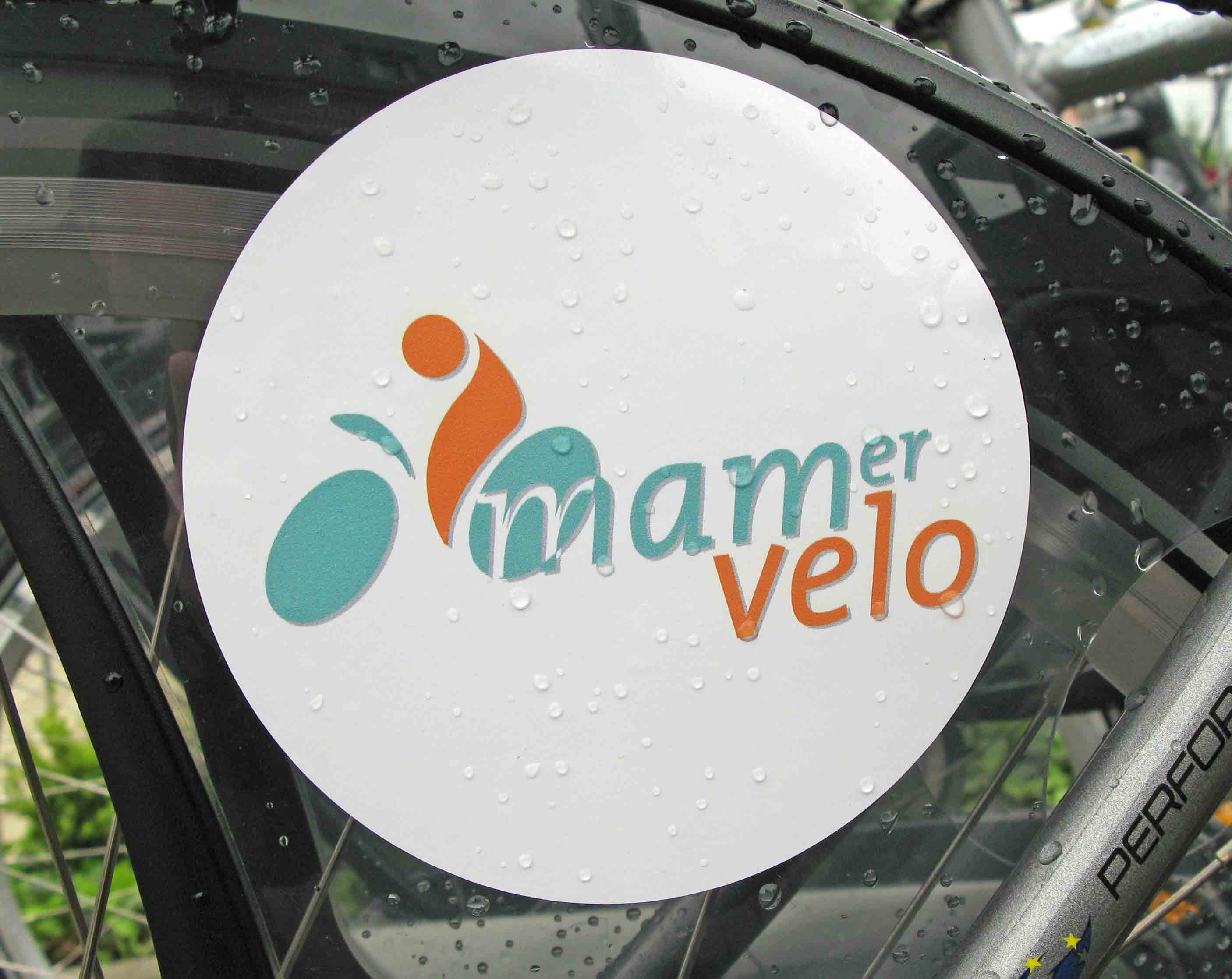 mamer velo Logo